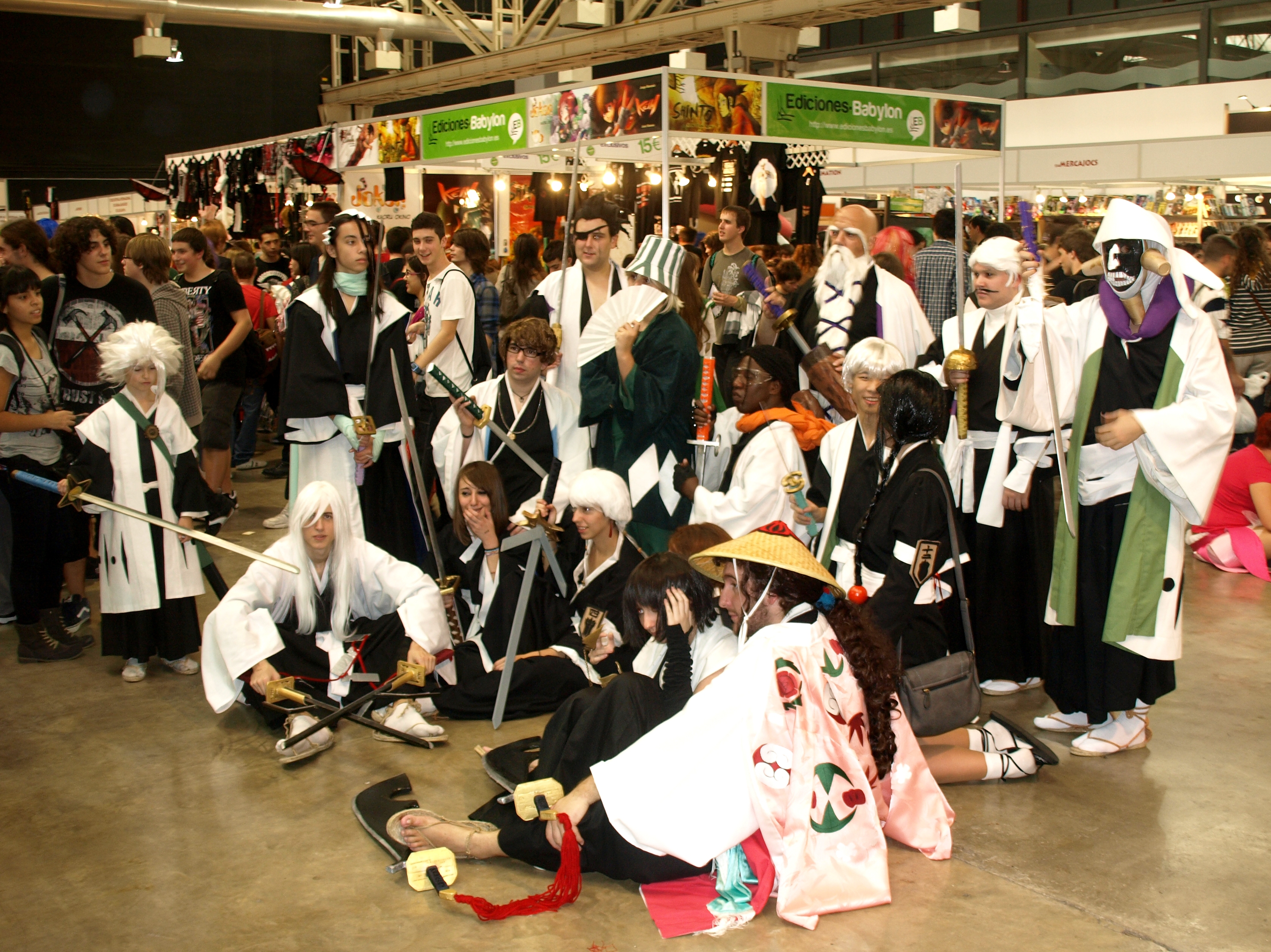 Salón del Manga de Barcelona (2011) en La Farga, Hospitalet de Llobregat (Barcelona, España).